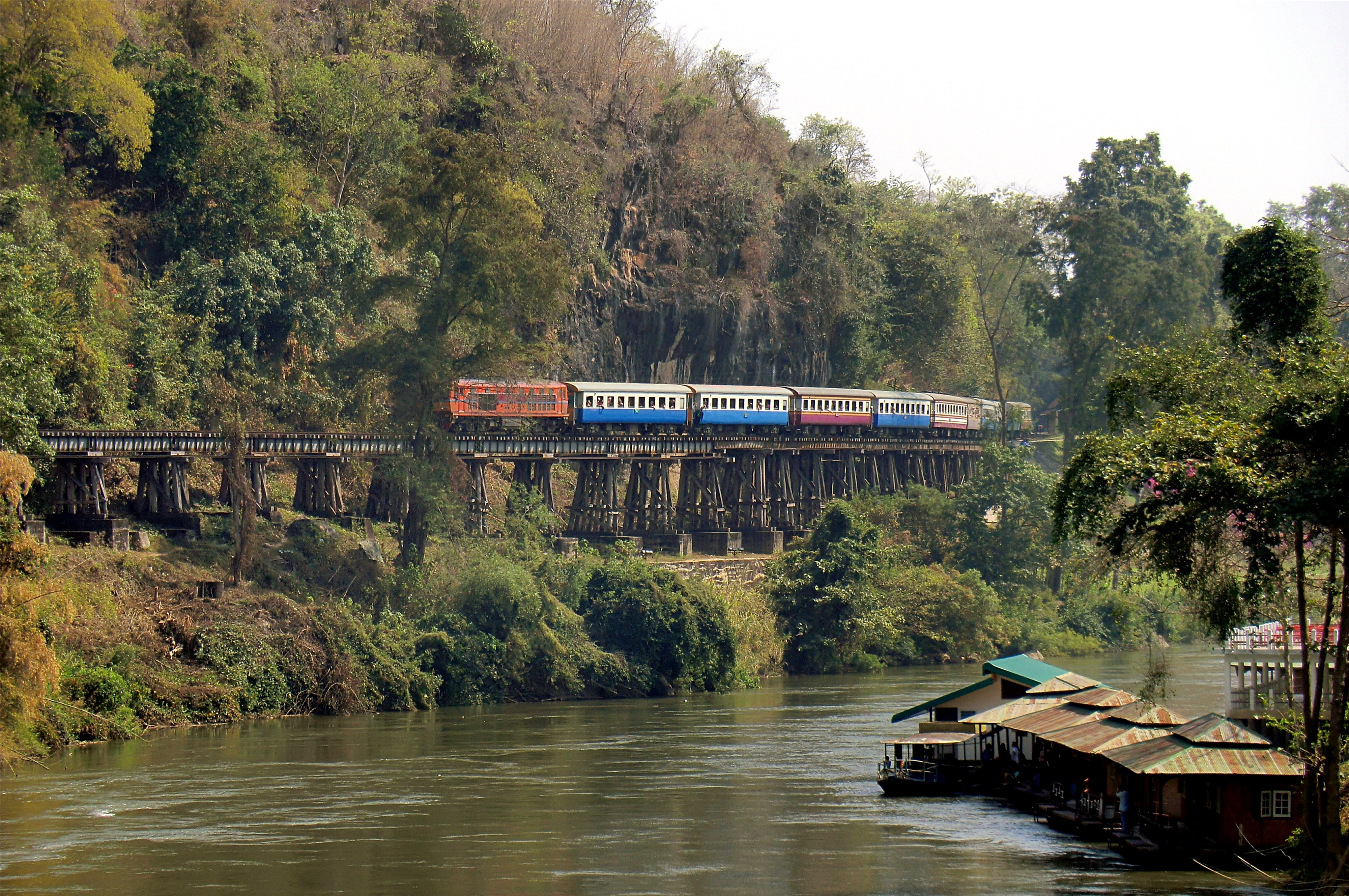 Le viaduc de Wang Pho. Voie ferrée de la mort, aux abords de la gare de Thamkra Sae, Thaïlande.